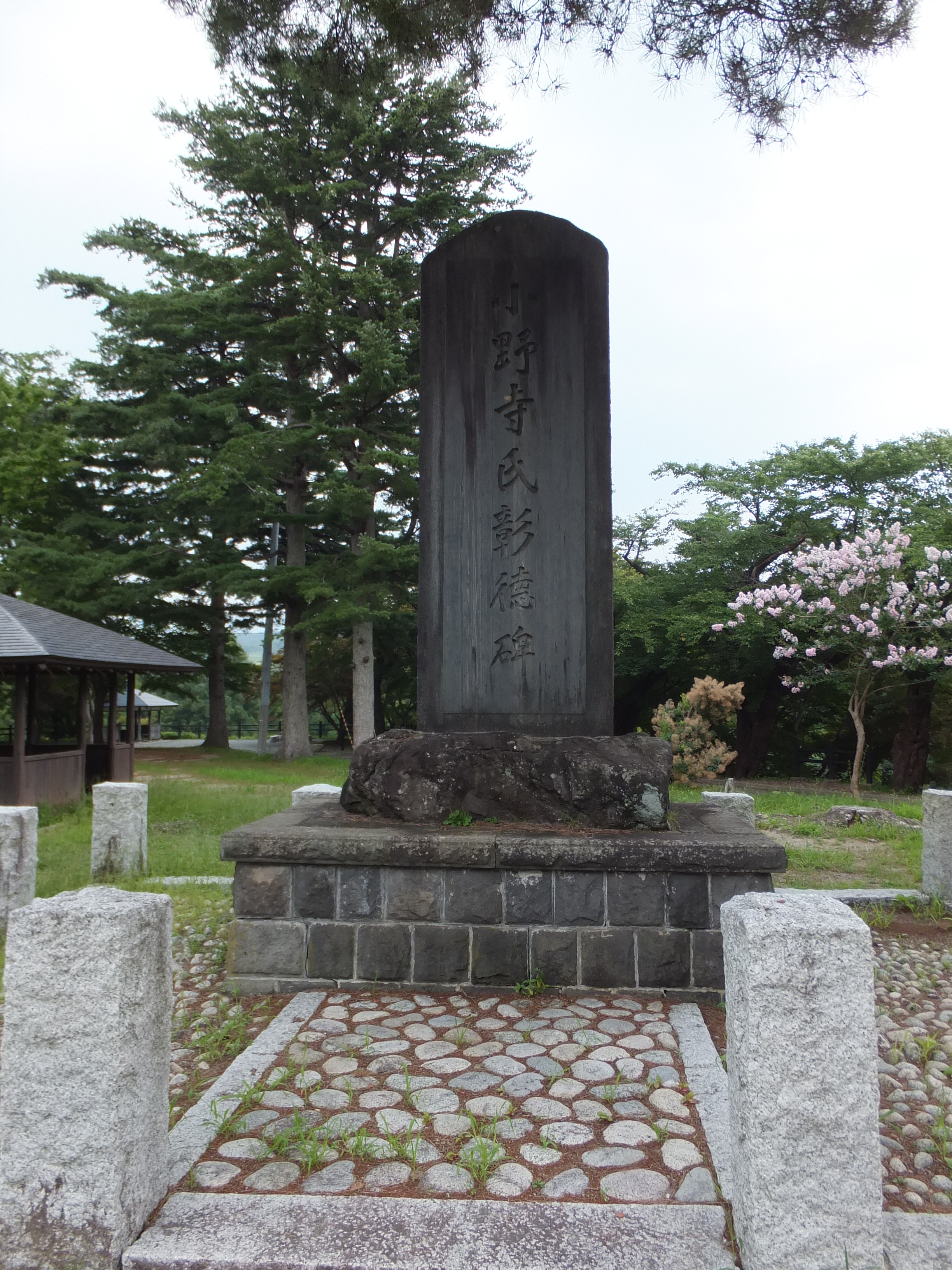 江戸時代以前に横手地方を領していた小野寺氏の彰德碑